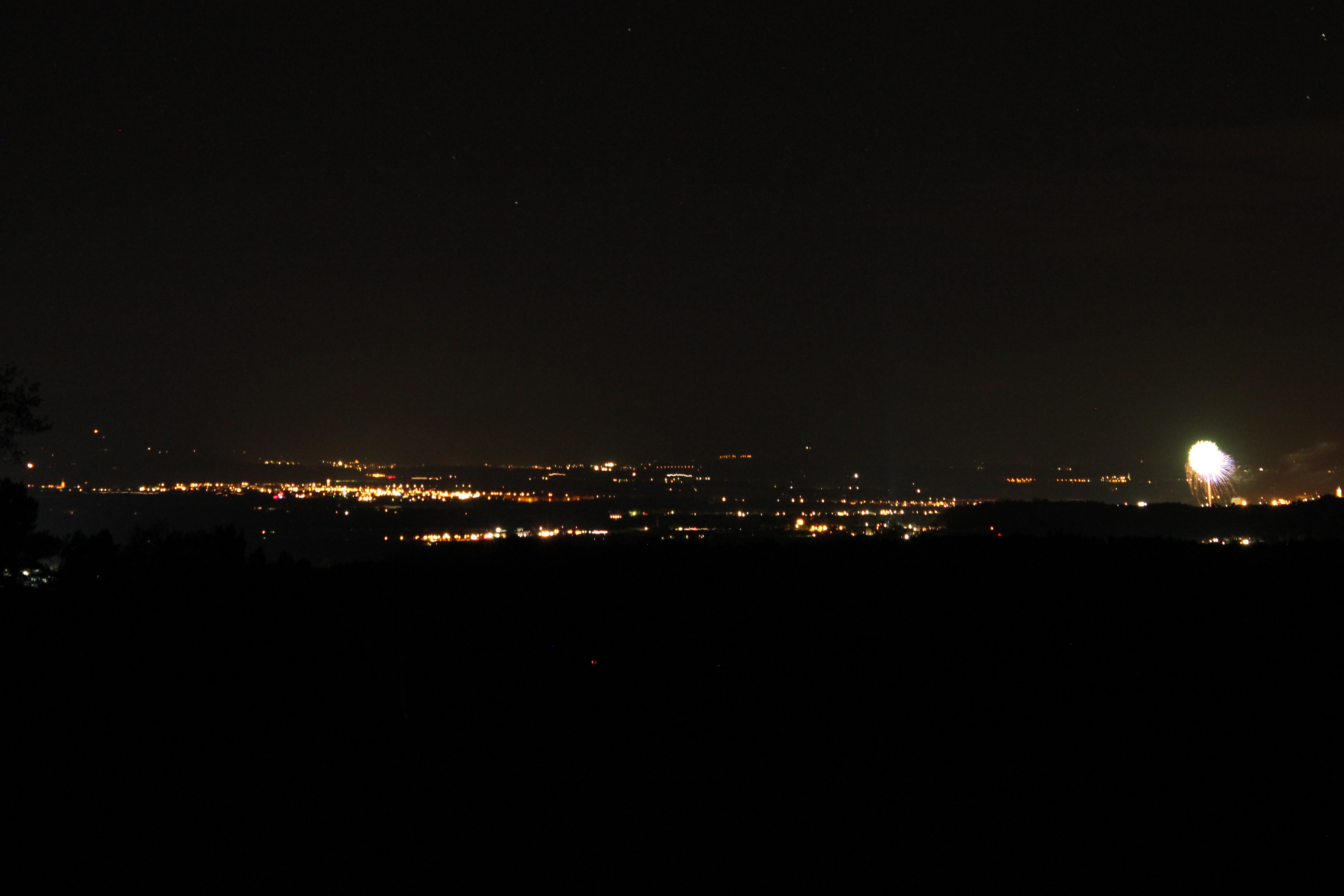 Schwertberg, Oberösterreich, Bezirk Perg, bei Nacht